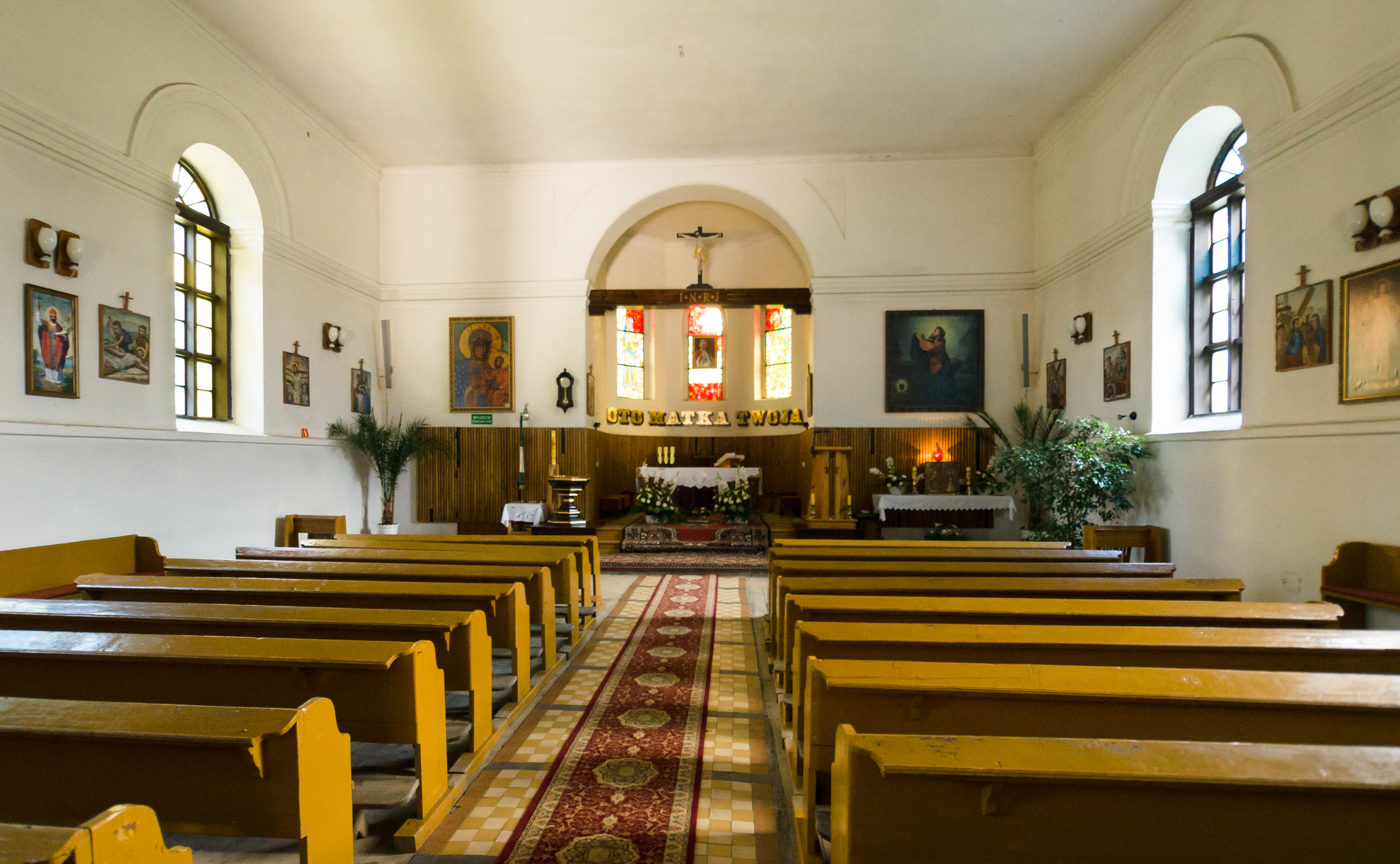 Dawny kościół ewangelicki, obecnie rzymsko-katolicki p.w. Opatrzności Bożej z 1832 roku w Sterławkach Wielkich (zabytek nr rejestr. 532)